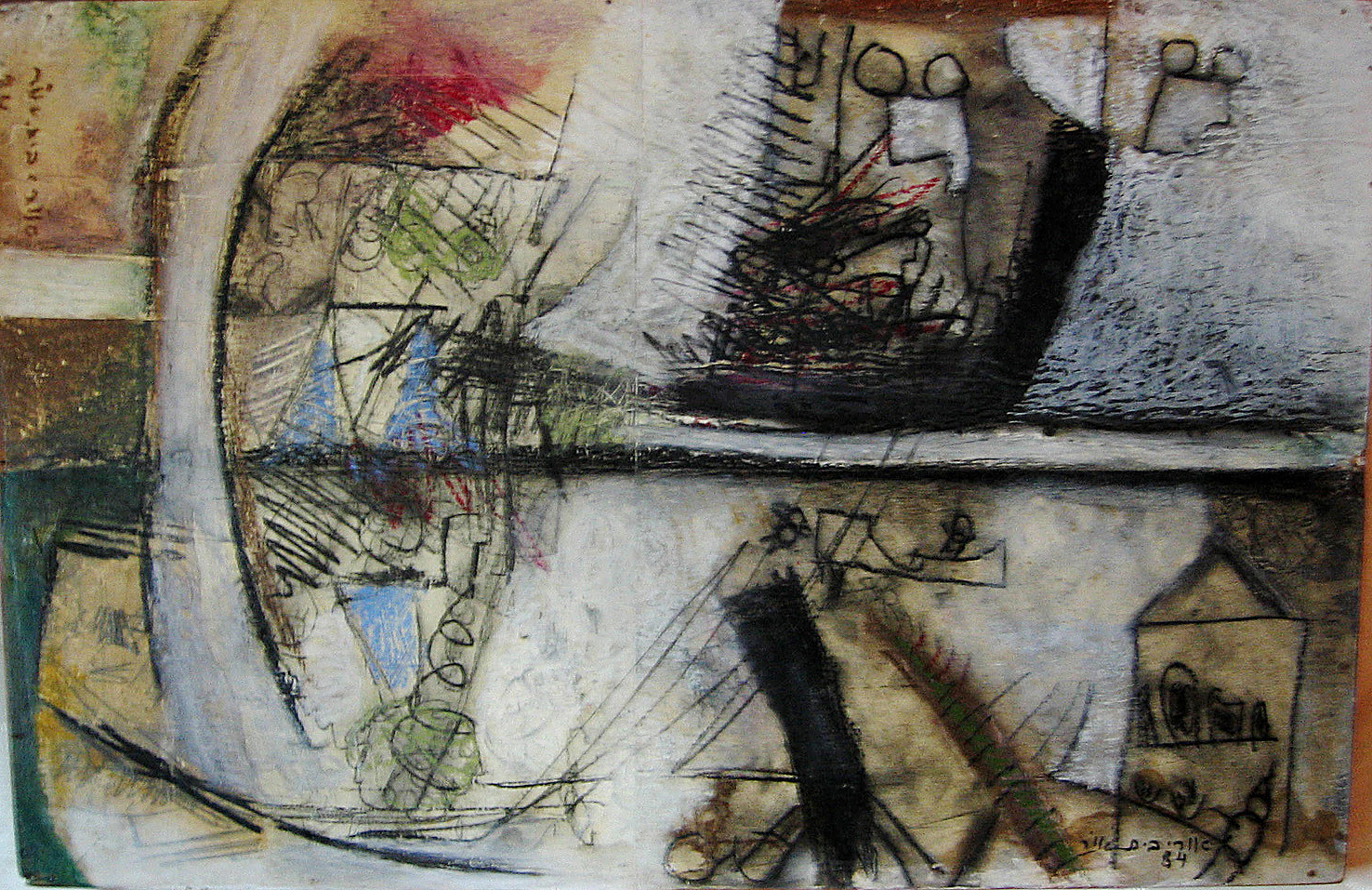 ציור של אוֹרי בית־אור, גיר ופנדה, 1984